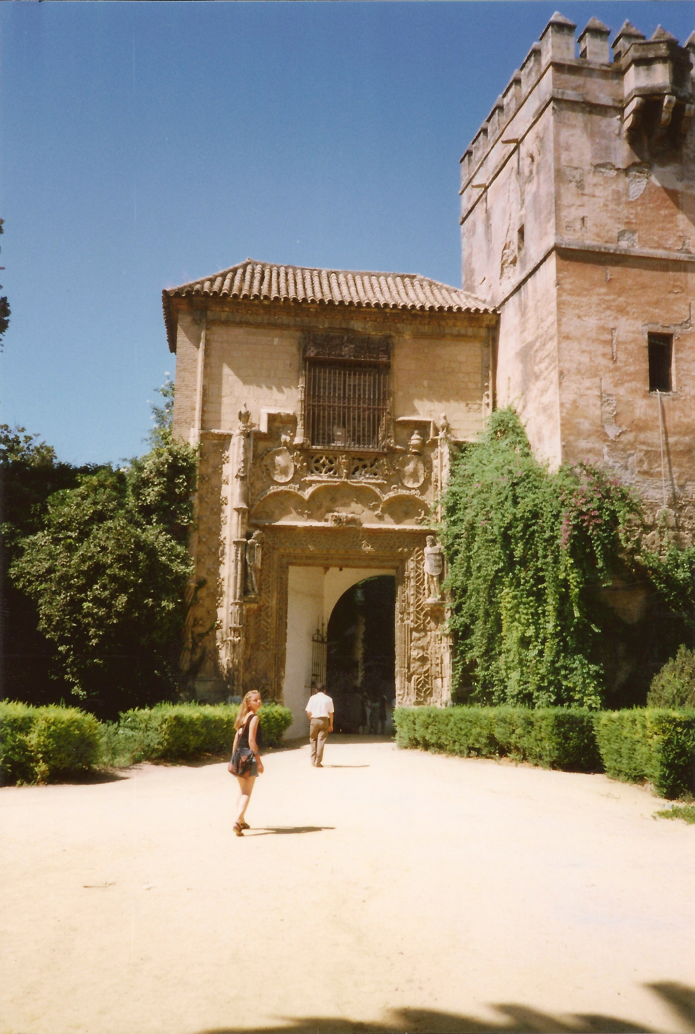 Alcázares de Sevilla